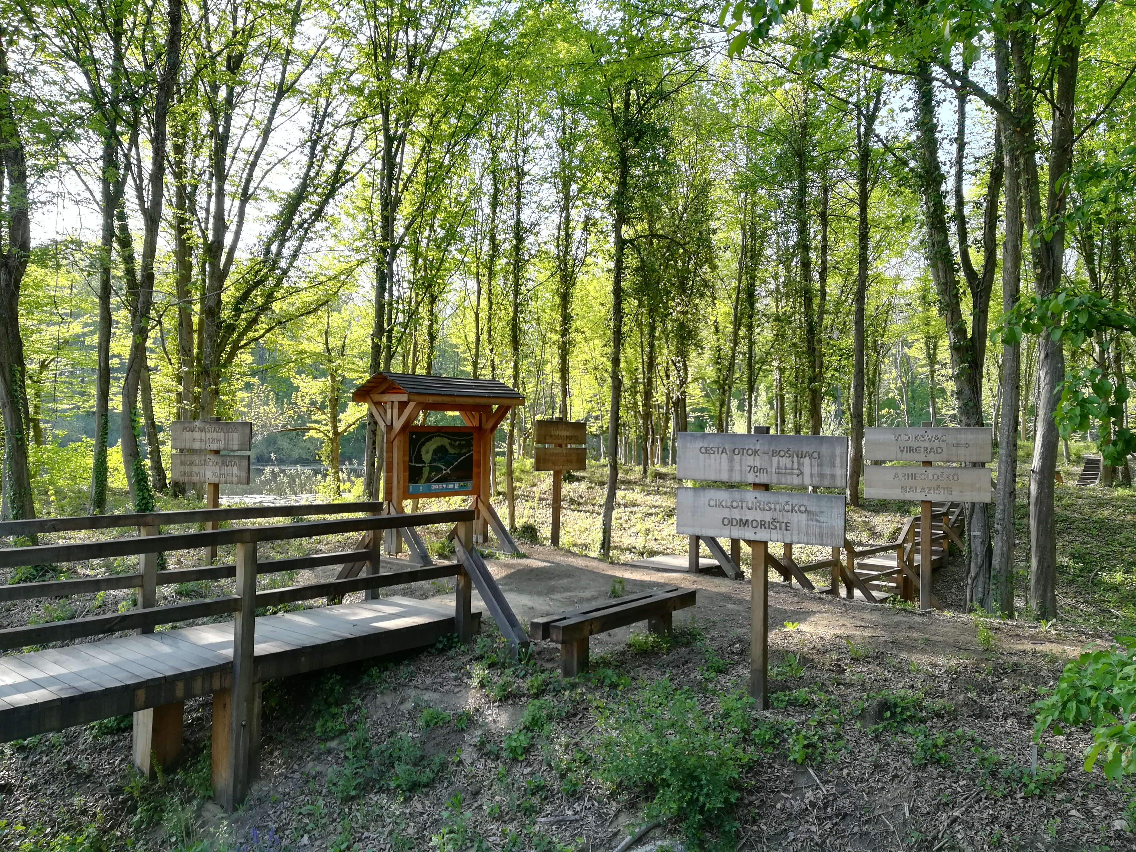 Arheološko nalazište Virgrad-Bošnjaci